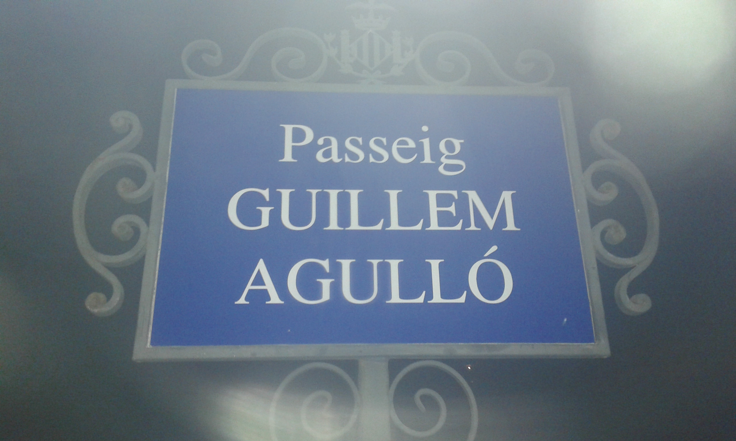 Passeig Guillem Agulló als Vivers de València